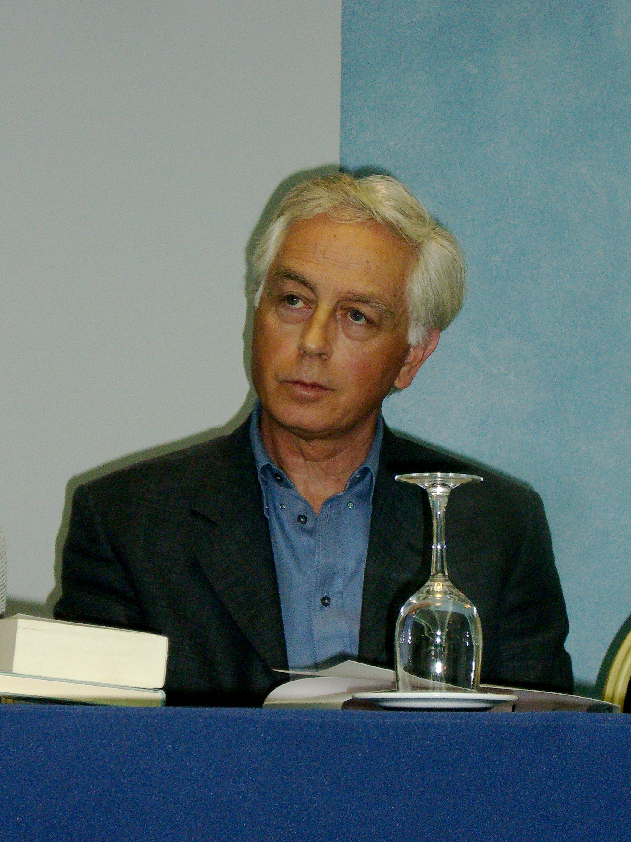 Il poeta italiano Eugenio De Signoribus